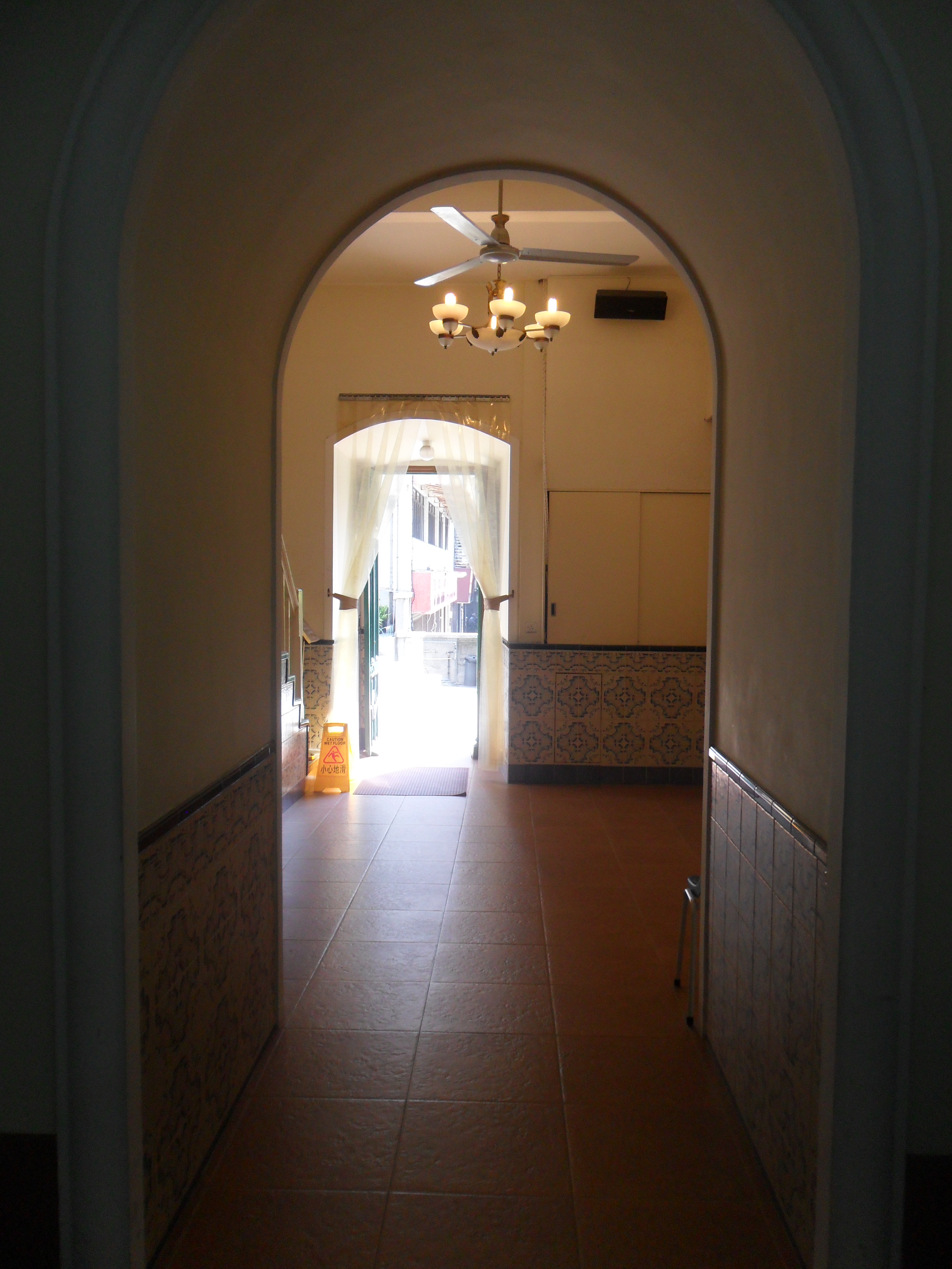 中文(香港): 聖安多尼堂, 澳門, 中國